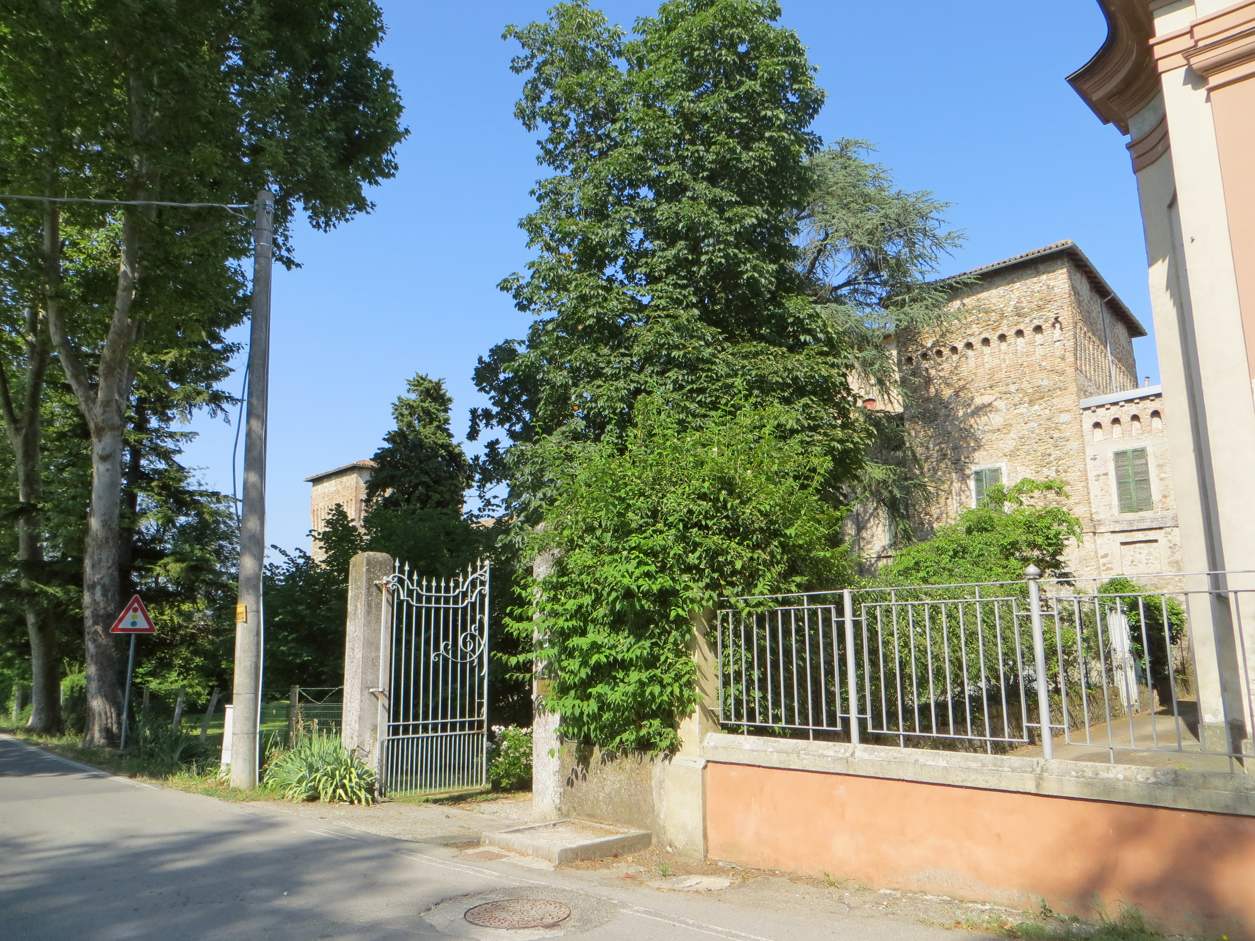 Castello (Panocchia, Parma) - torrione sud